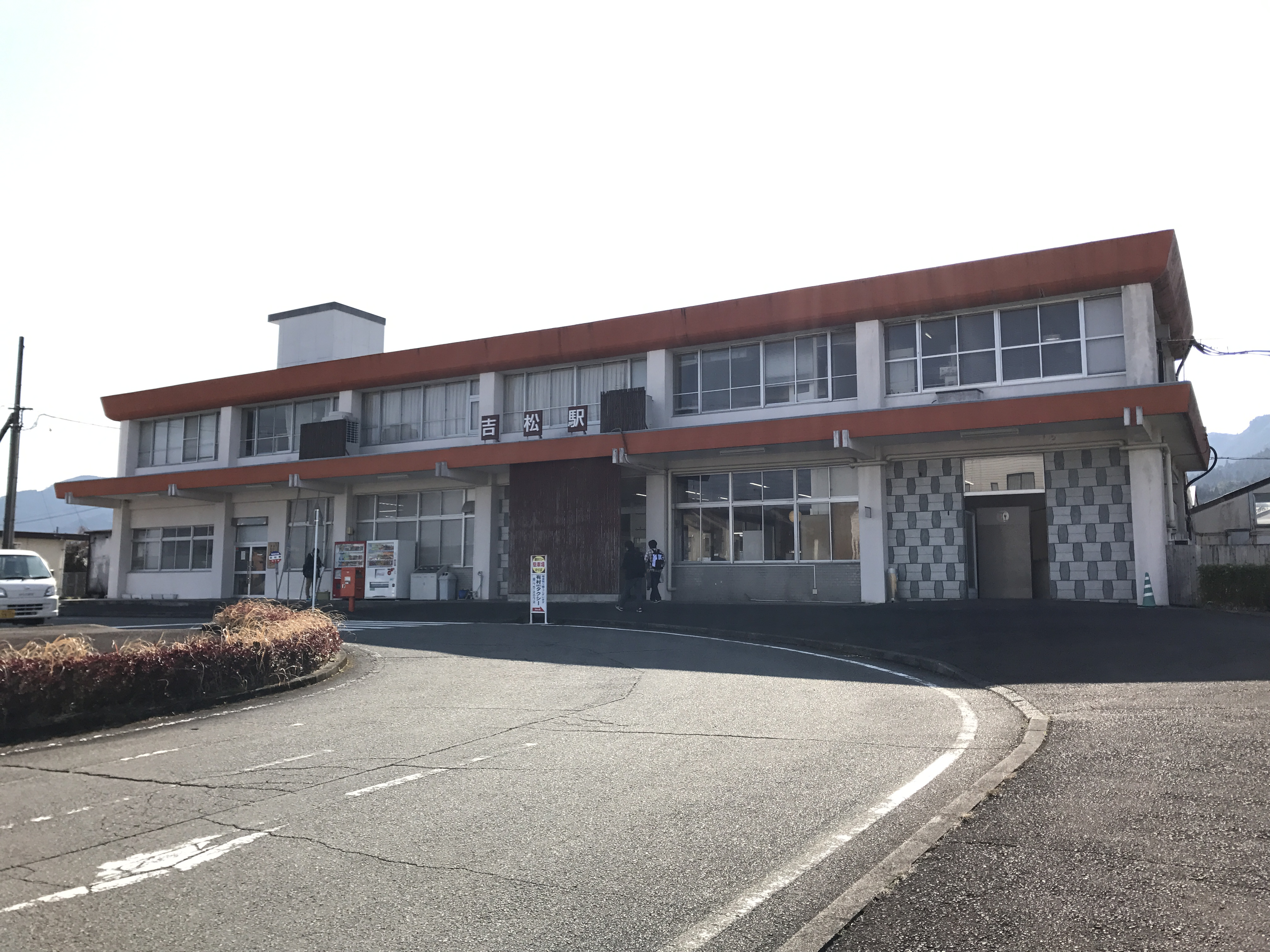 吉松駅駅舎